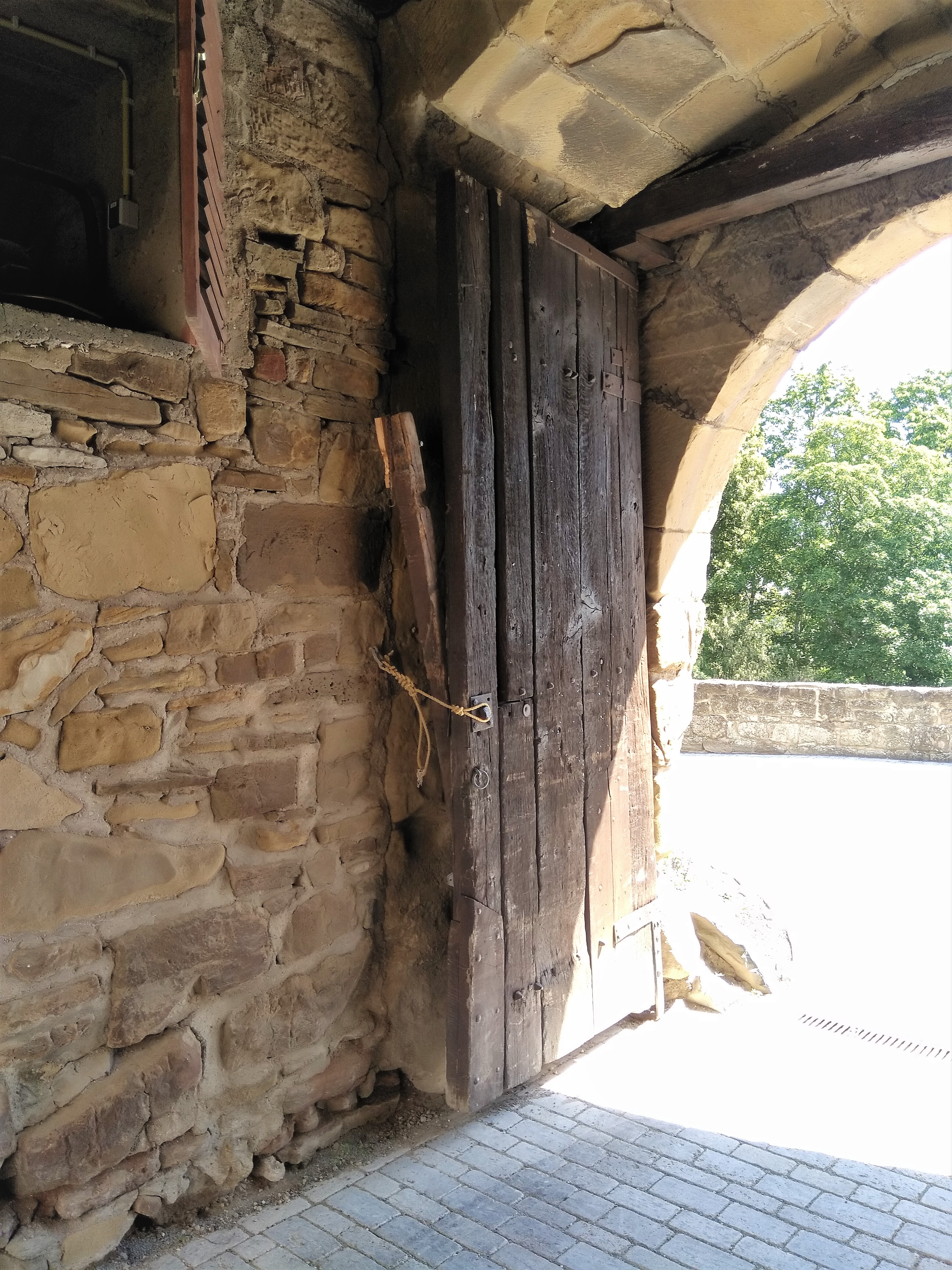 Vaade pealinnuse kirdenurgas asuvale väravale. Väravad olid samasugustel võllhingedel, nagu eeslinnuse keskmine väravgi.